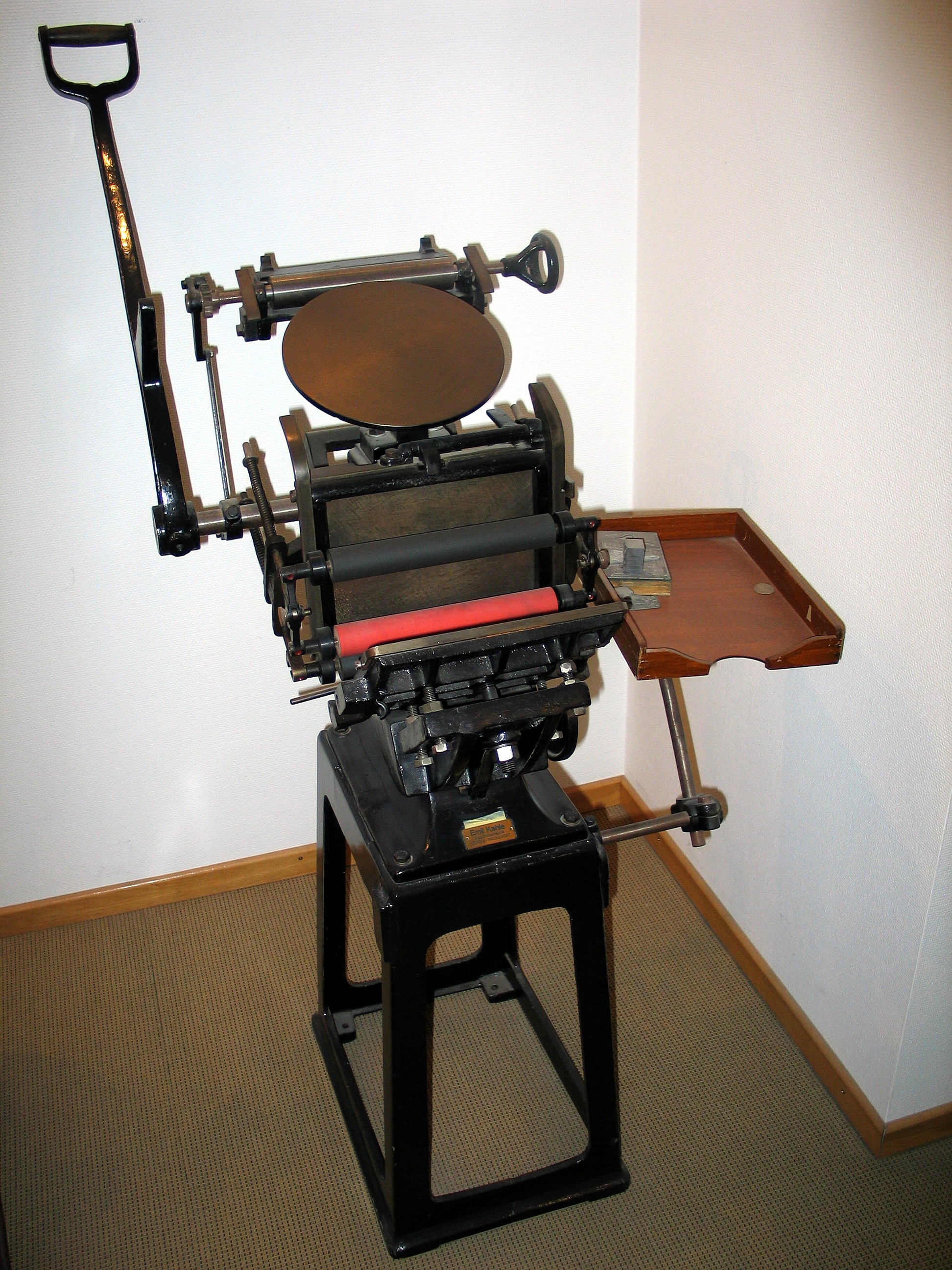 Ein Boston-Tiegel der Firma Emil Kahle, Maschinenfabrik Leipzig-Paunsdorf, Ausstellungsstück in der Bürozentrale der Druckerei Fiedeler & Bayer, die heute (Stand: 12/2012) unter der Adresse Am Hohen Ufer 3A im ehemaligen Königlichen Marstall von Hannover residiert ...